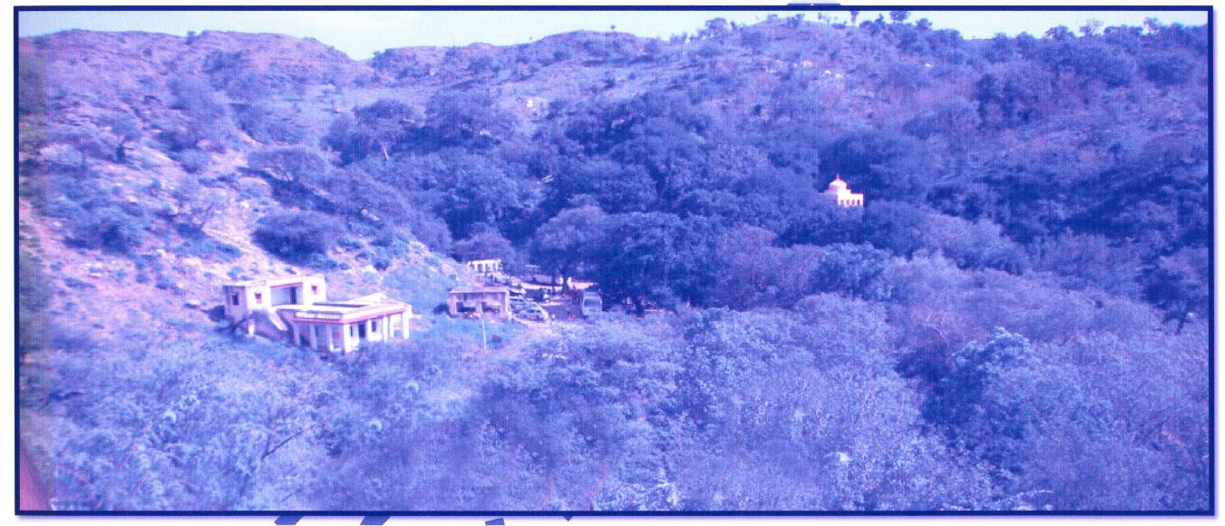 टॉडगढ